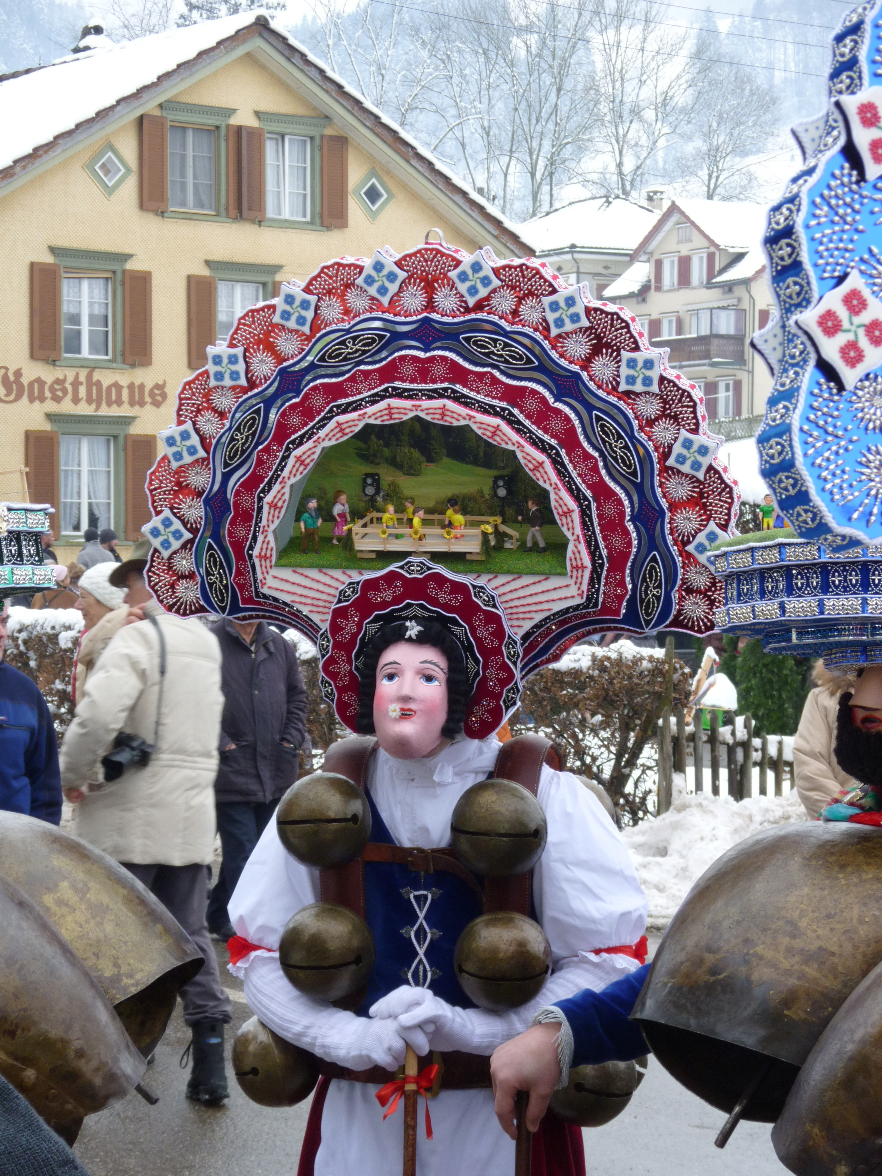 Schöner Silvesterklaus in Urnäsch